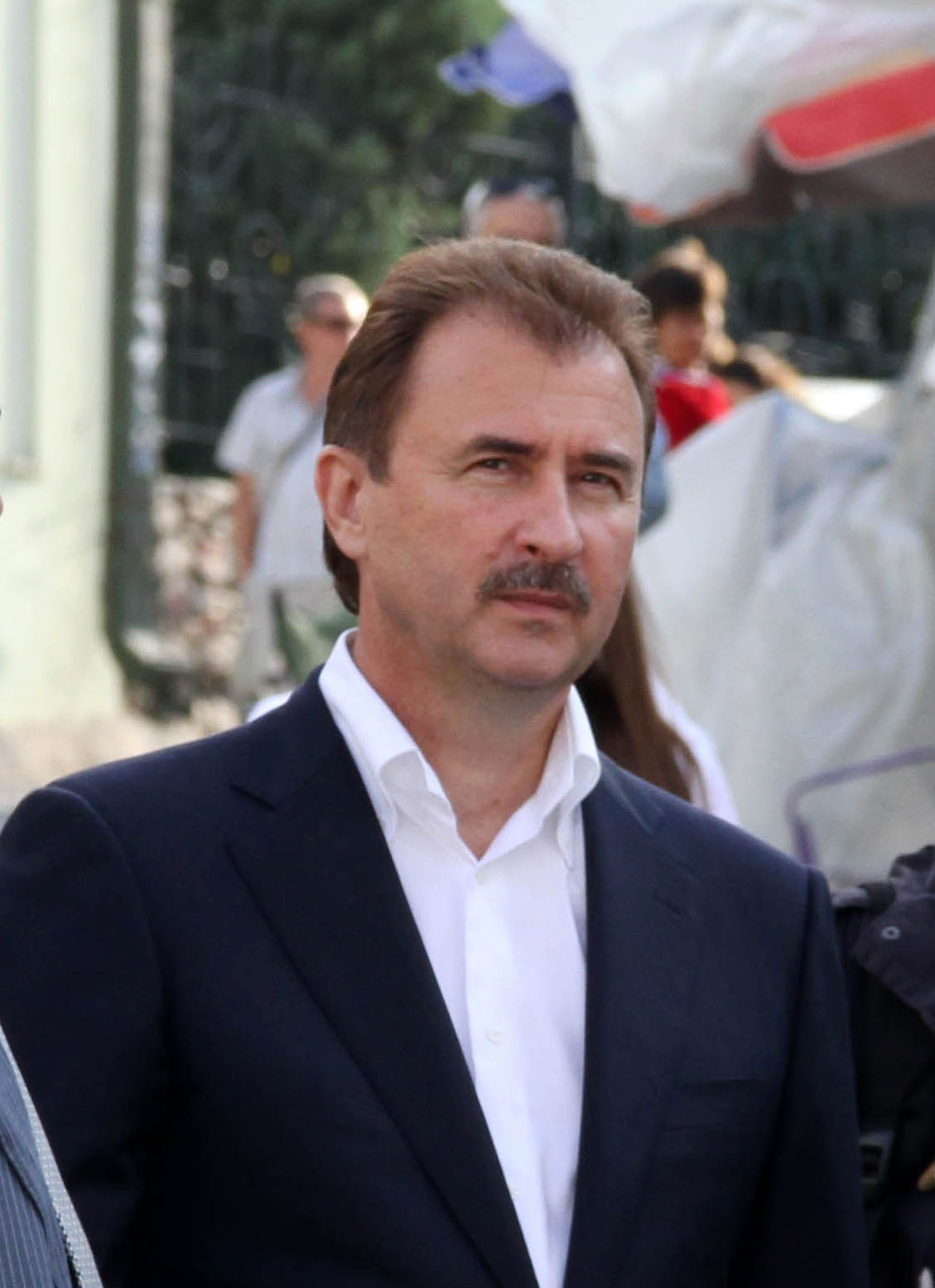 Попов, Александр Павлович